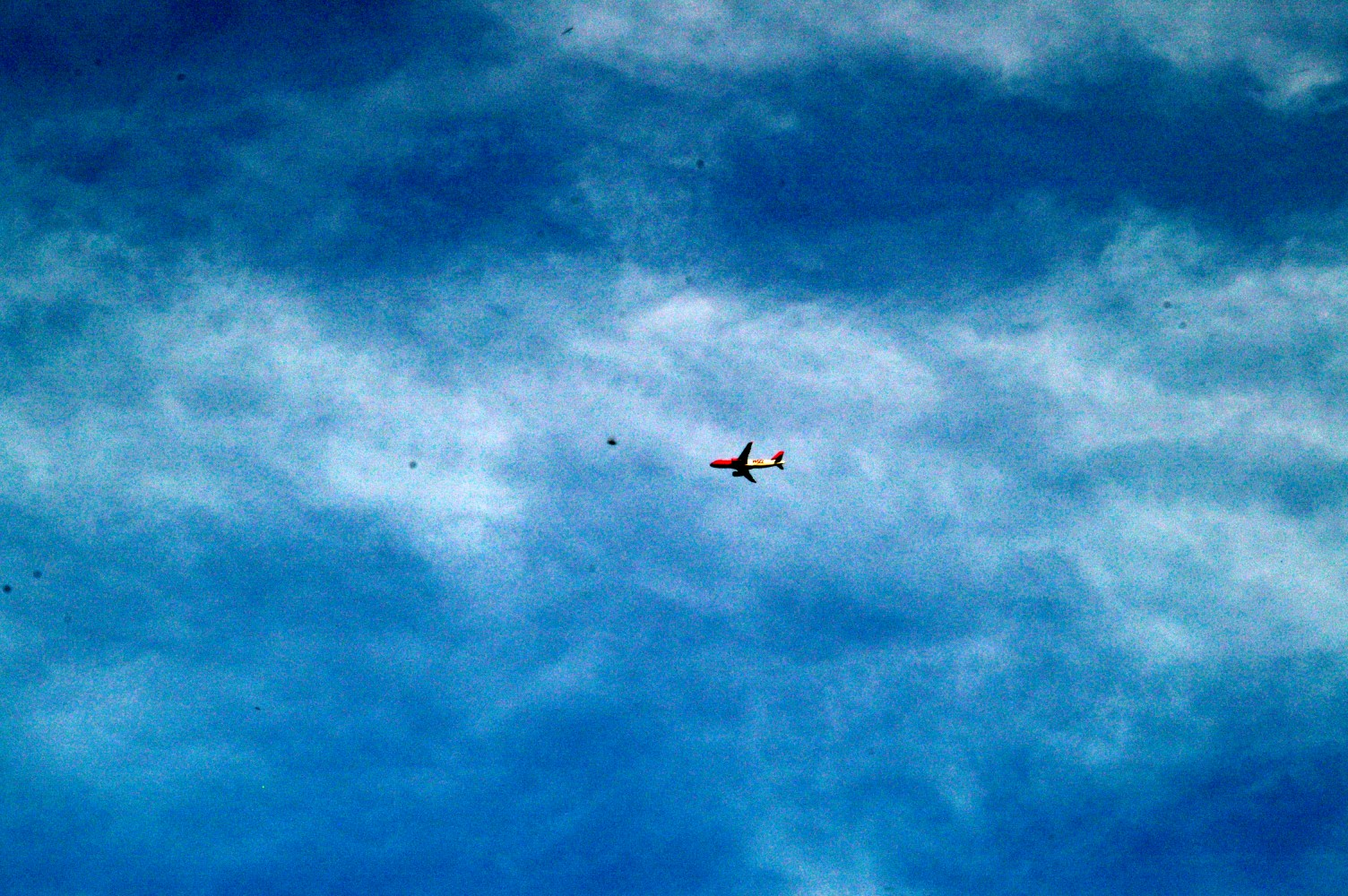 Staubablagerungen auf dem Sensor einer digitalen Spiegelreflexkamera. Zur deutlicheren Darstellung in der Bildbearbeitung kontrastverstärkt